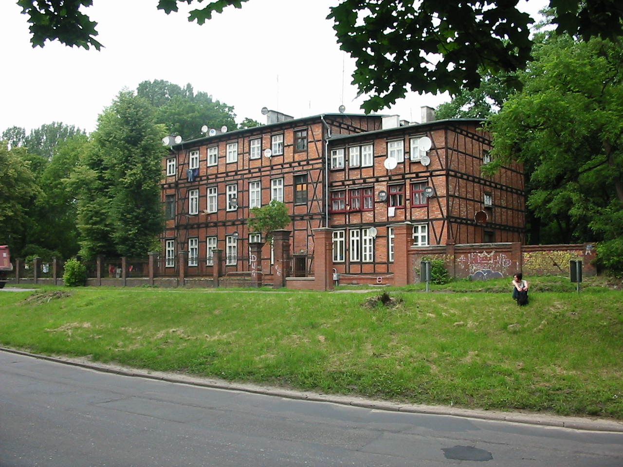 Budynek w Toruniu, przy ul. Dybowskiej 6, gdzie w latach 1922 - 1925 mieściła się Oficerska Szkoła Marynarki Wojennej